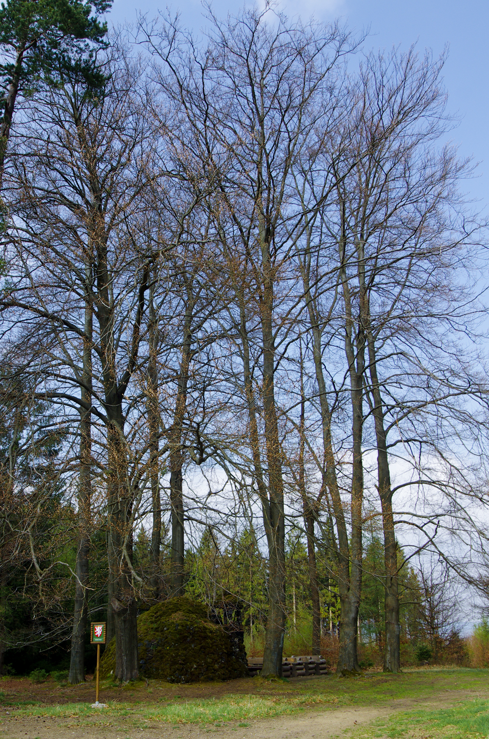 památné stromy - Buky u kapličky na Šibečním vrchu u Libnova, okres Sokolov